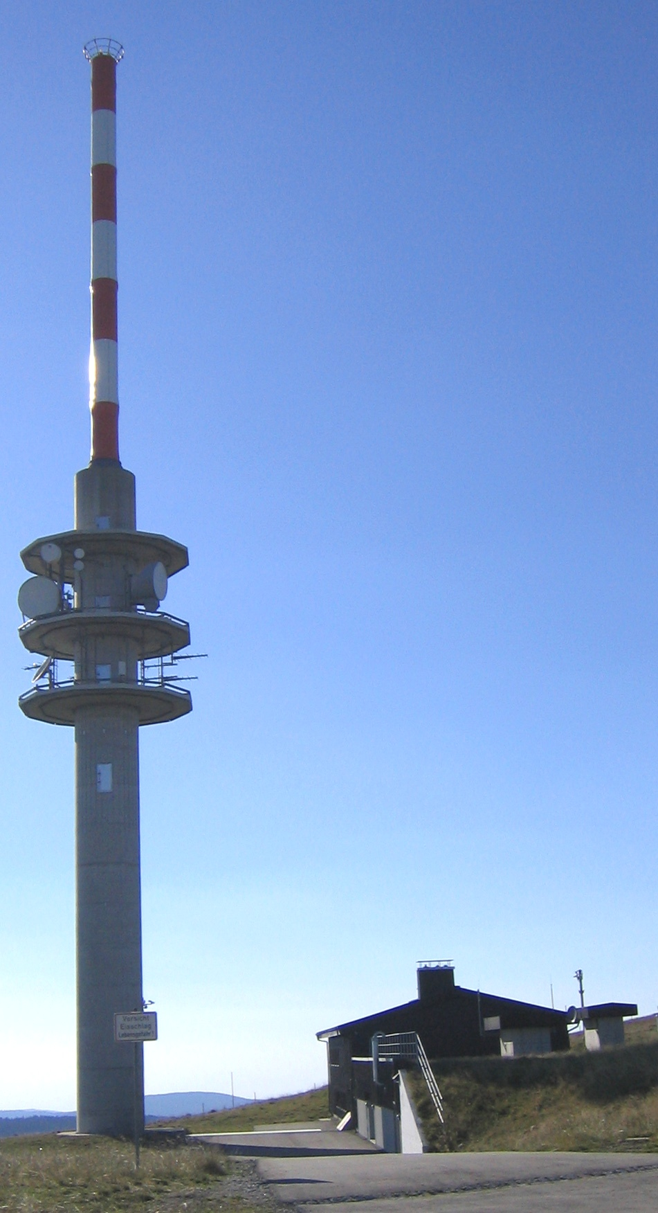 Feldberg neien Tuerm.